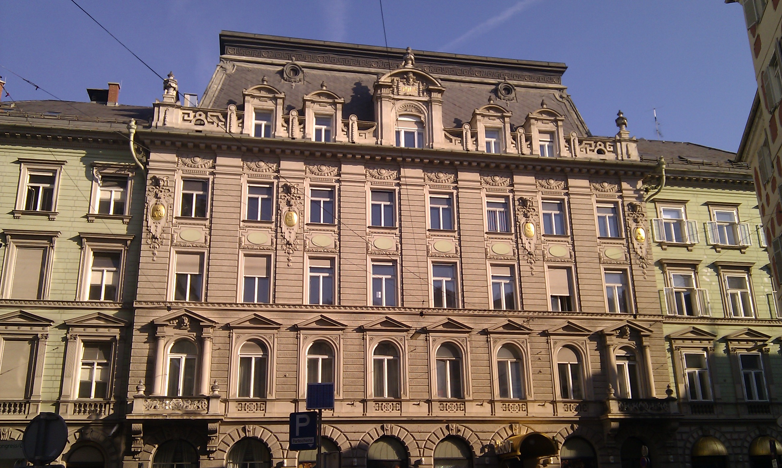 Casino Graz und Grazer Congress, Landhausgasse 10-12